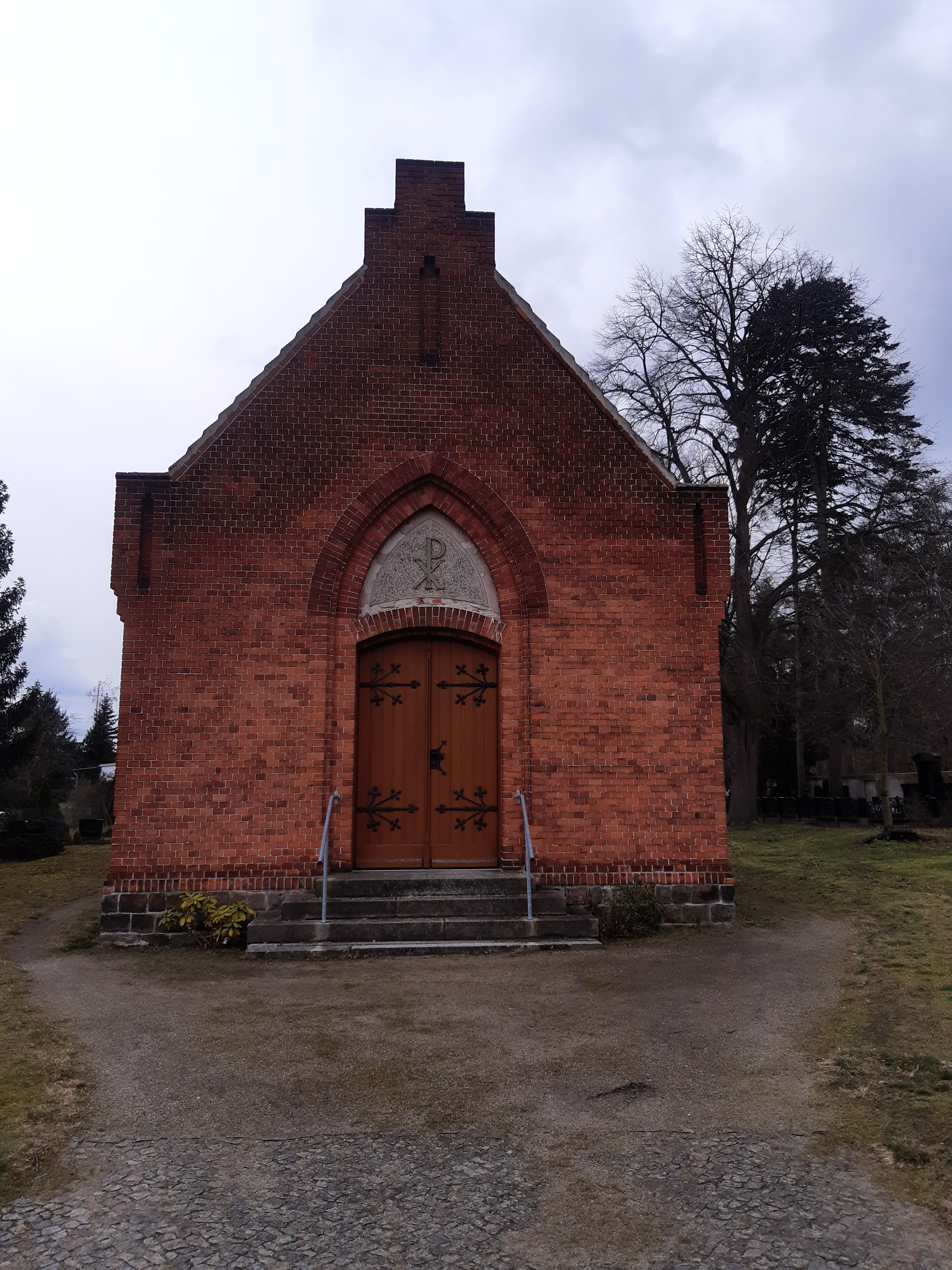 Friedhof